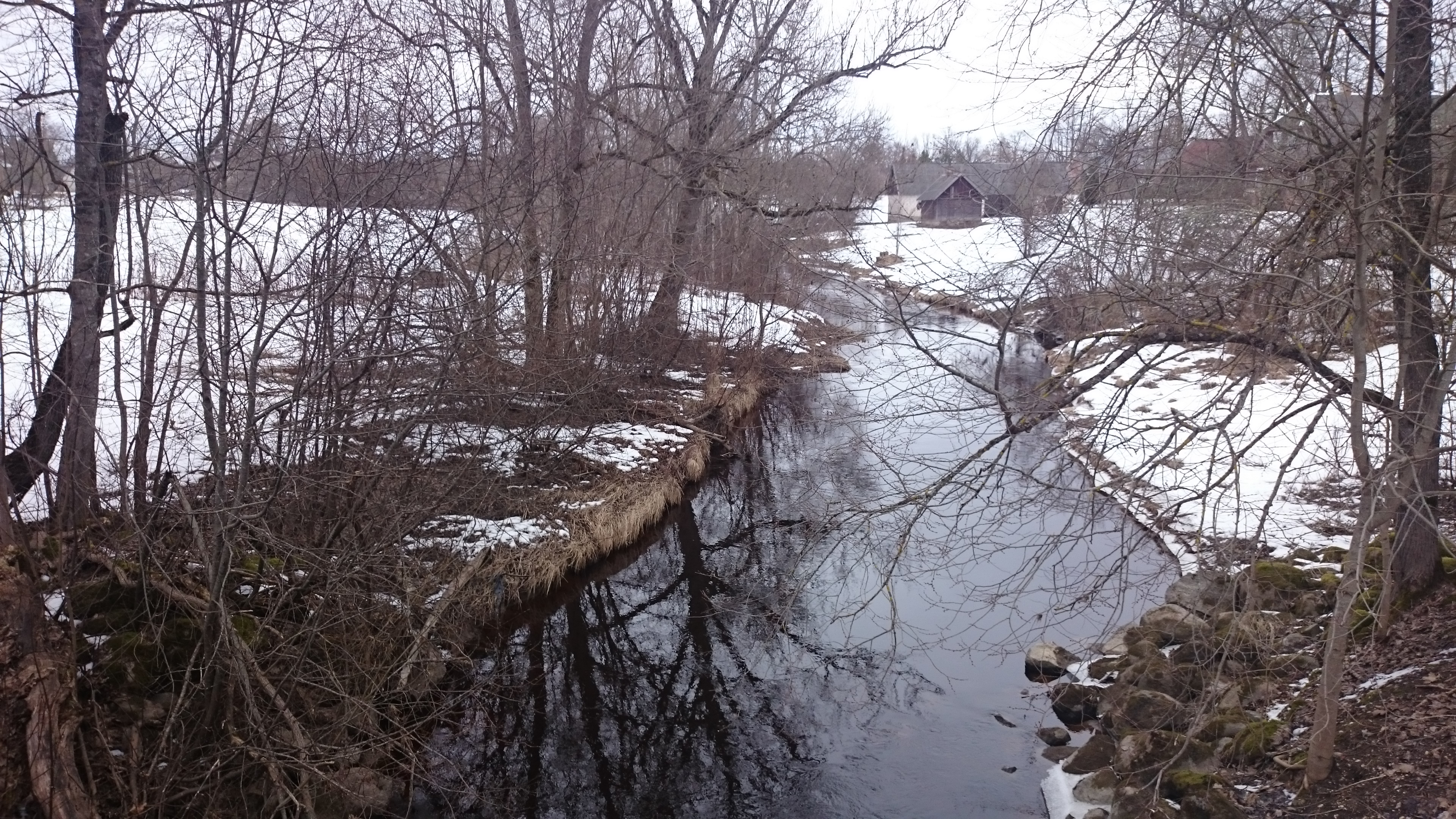 Käru